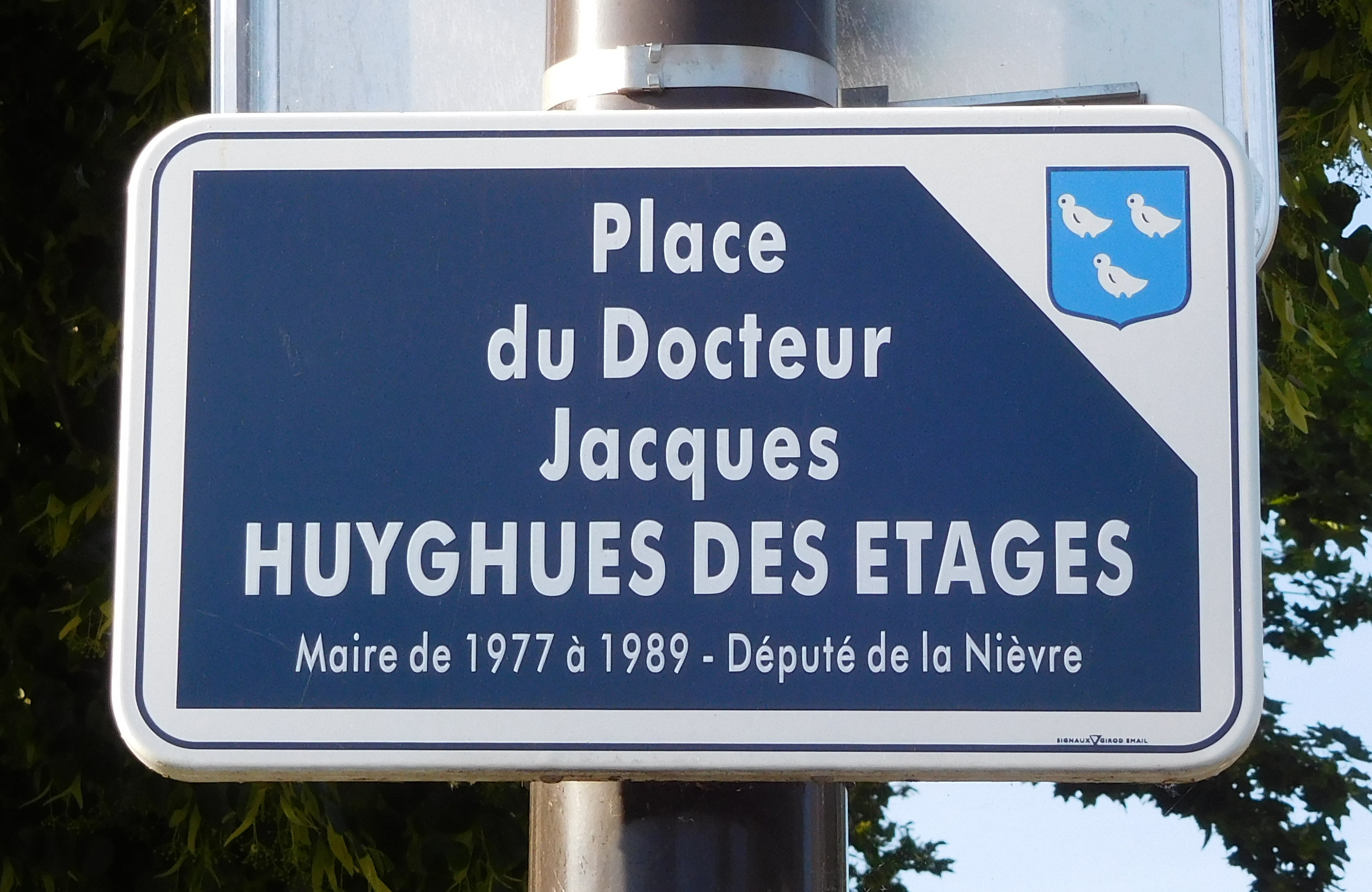 Panneau de la place du Docteur-Jacques-Huyghues-des-Étages ; Cosne-Cours-sur-Loire, Nièvre, France.